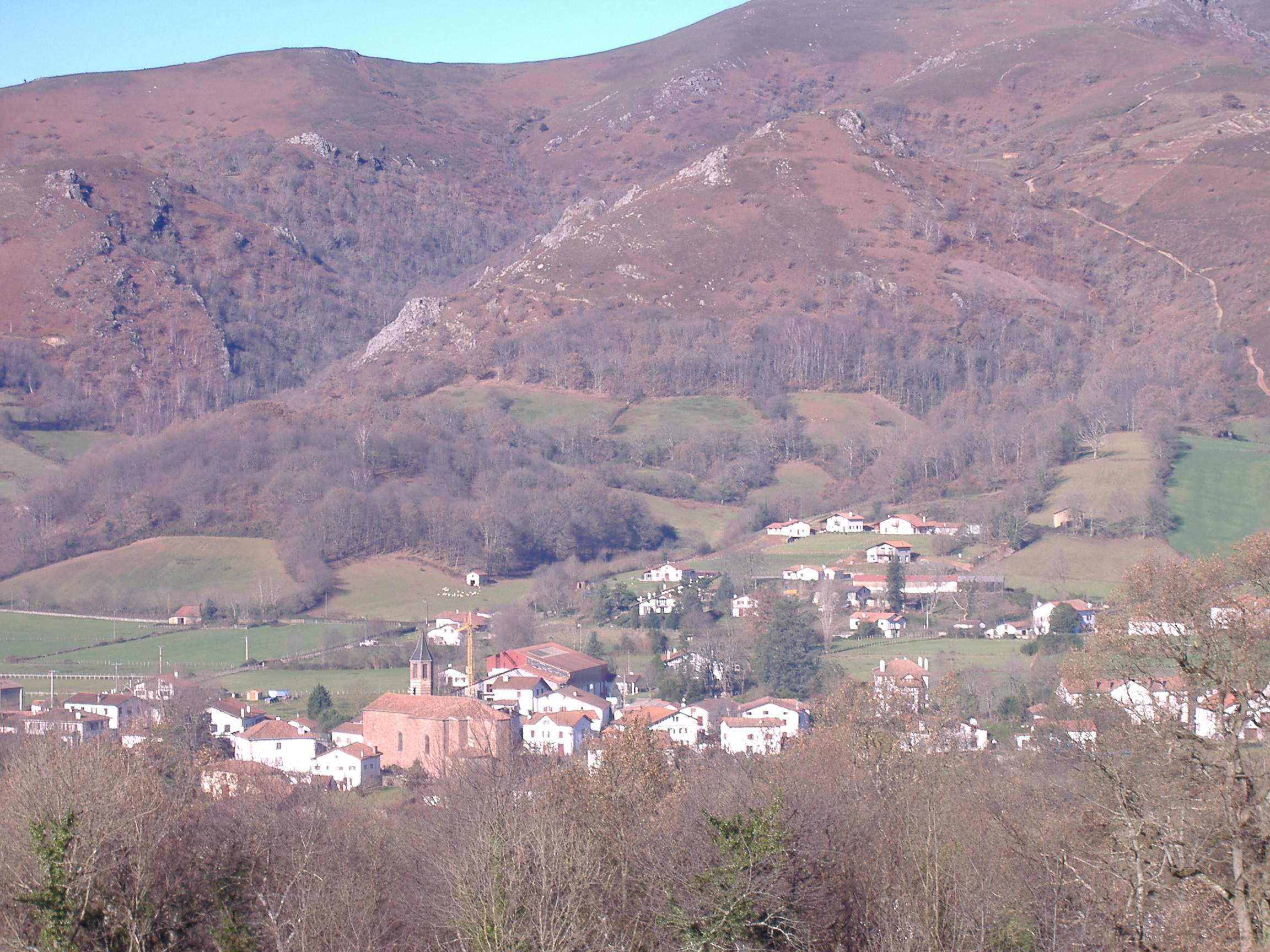 Le bourg d'Ossès